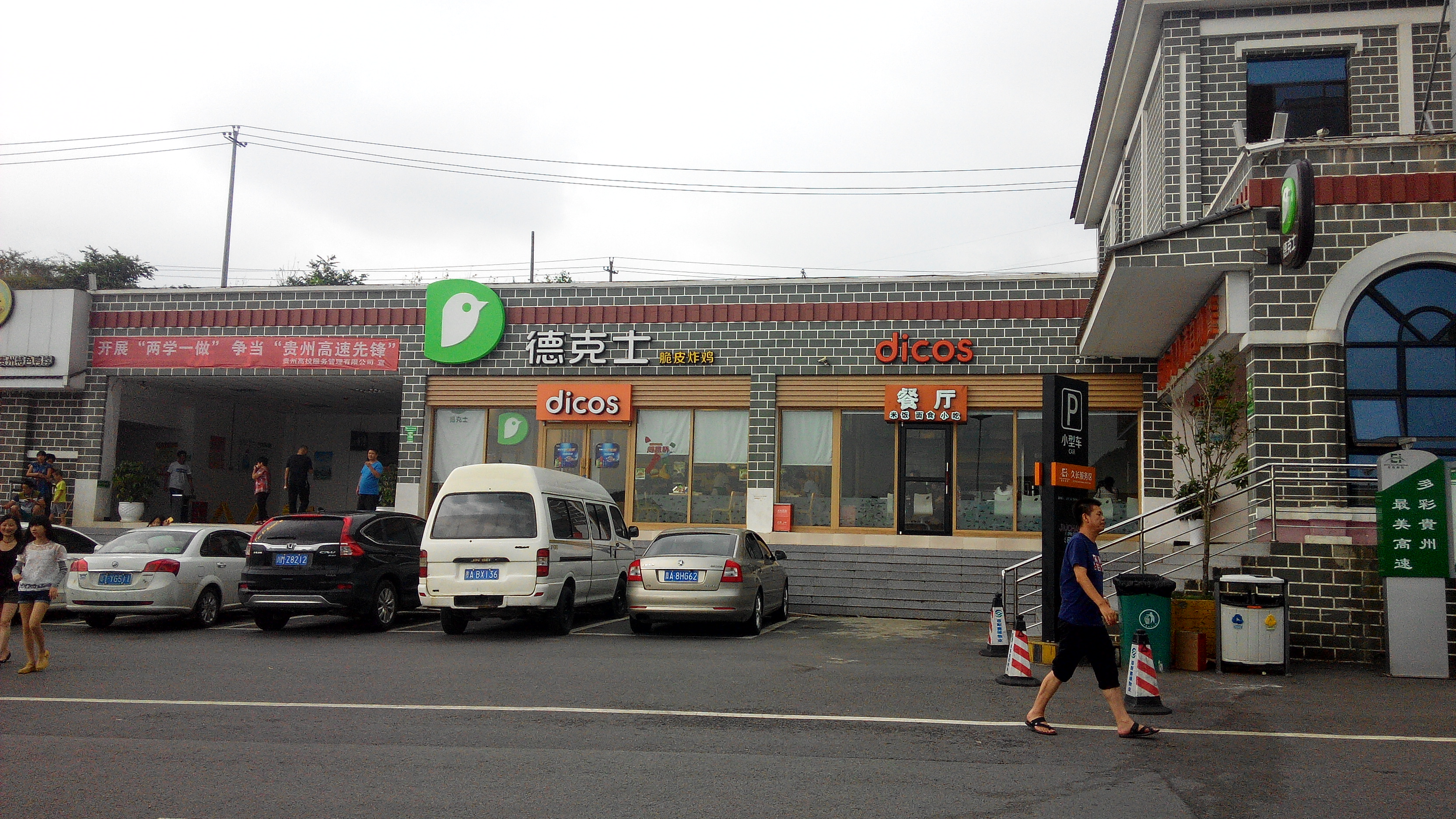 中国高速G75 海口方向 久长服务区德克士餐厅